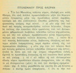 Epístola a Flora de Ptolomeo. Extracto de la Carta a Flora de Ptolomeo en el original griego de la obra "Ptolemaeus Brief an die Flora" de Adolf von Harnack,1904.